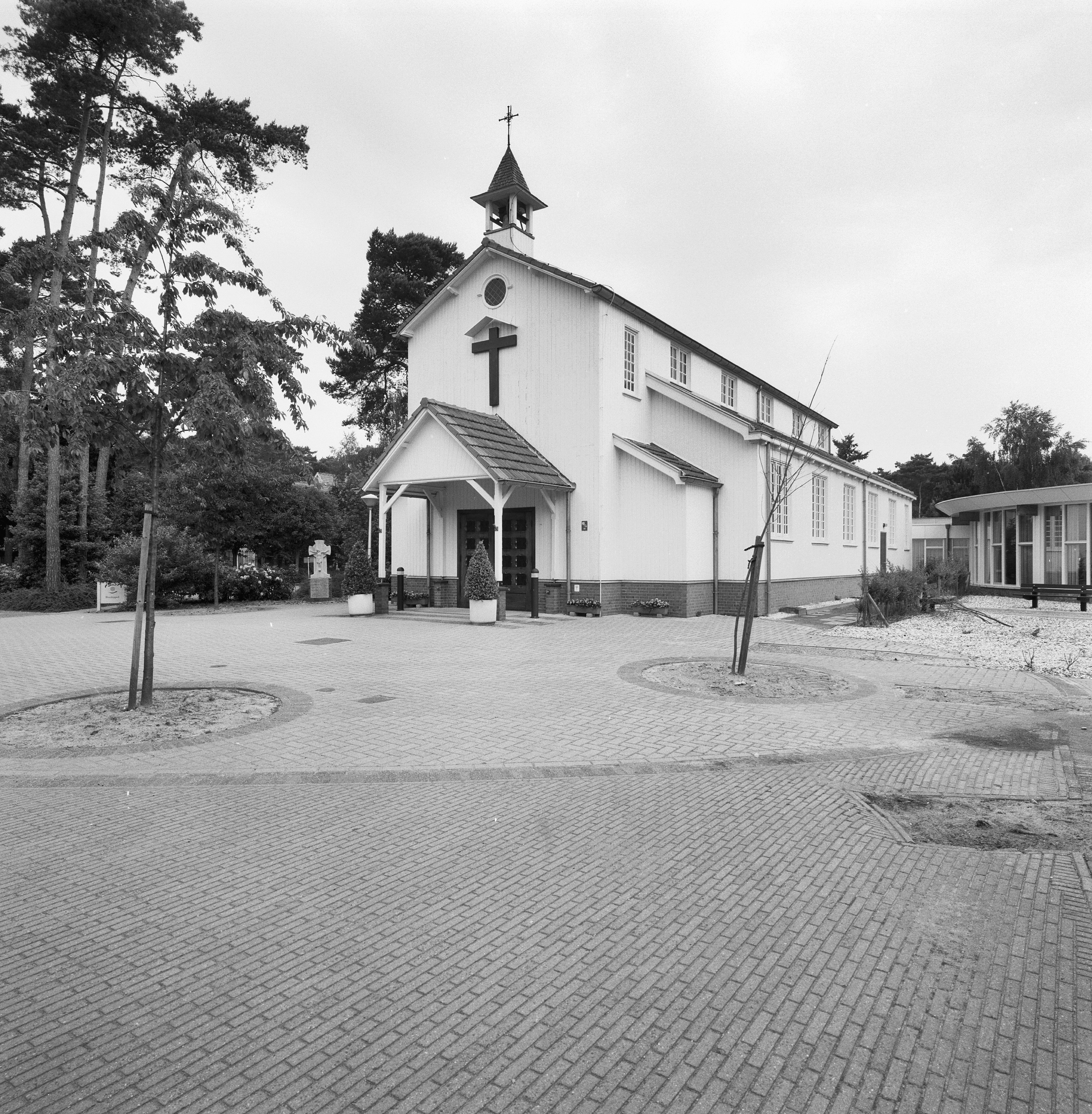 Sanatorium Hornerheide: Overzicht zuidwestgevel Boskapel (opmerking: Gefotografeerd voor Monumenten In Nederland Limburg)